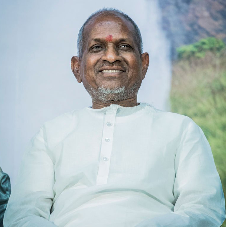 Ilaiyaraaja at Merku Thodarchi Malai Press Meet